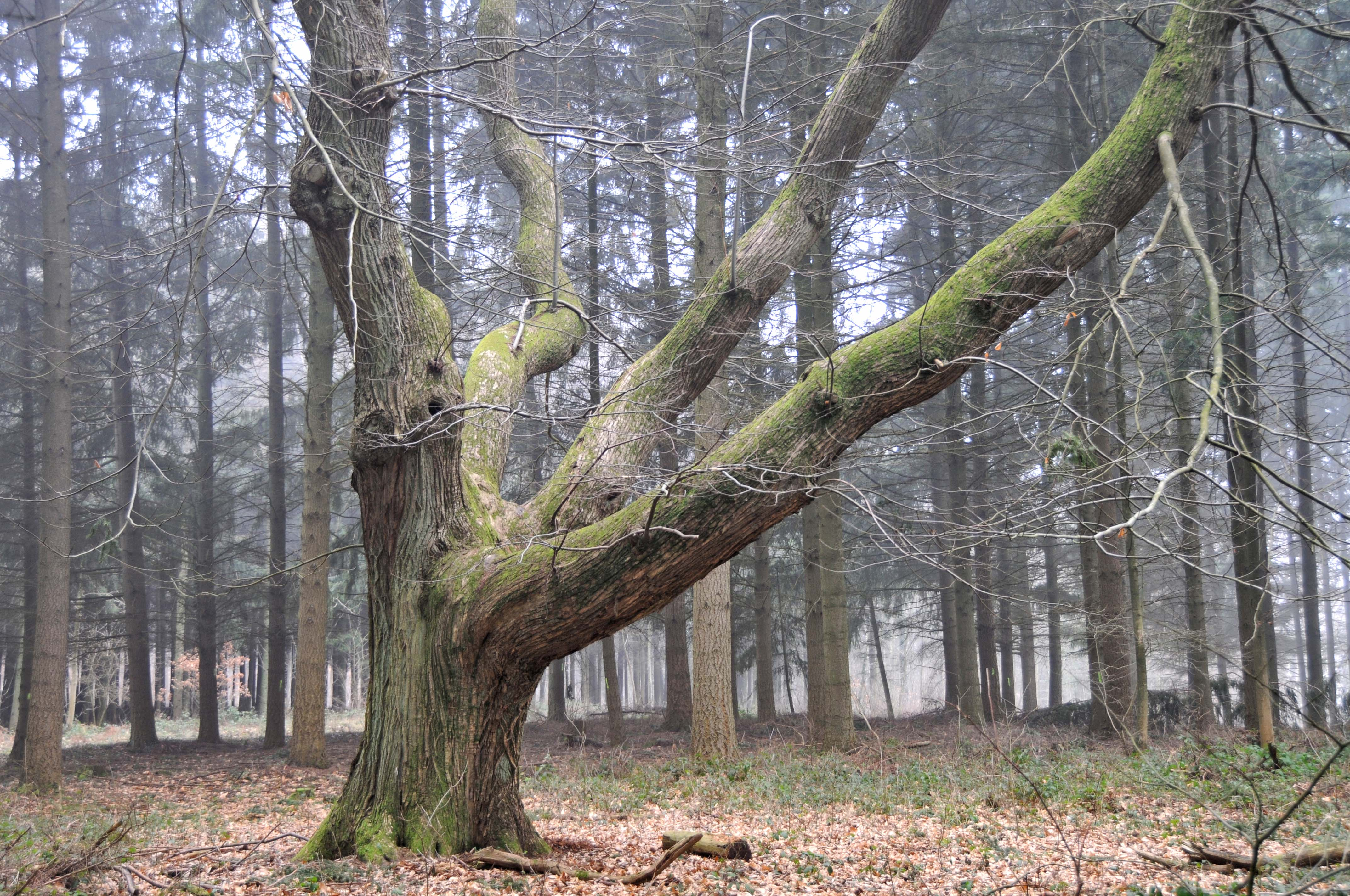 Séisskäschtebam um Scheedhaff.